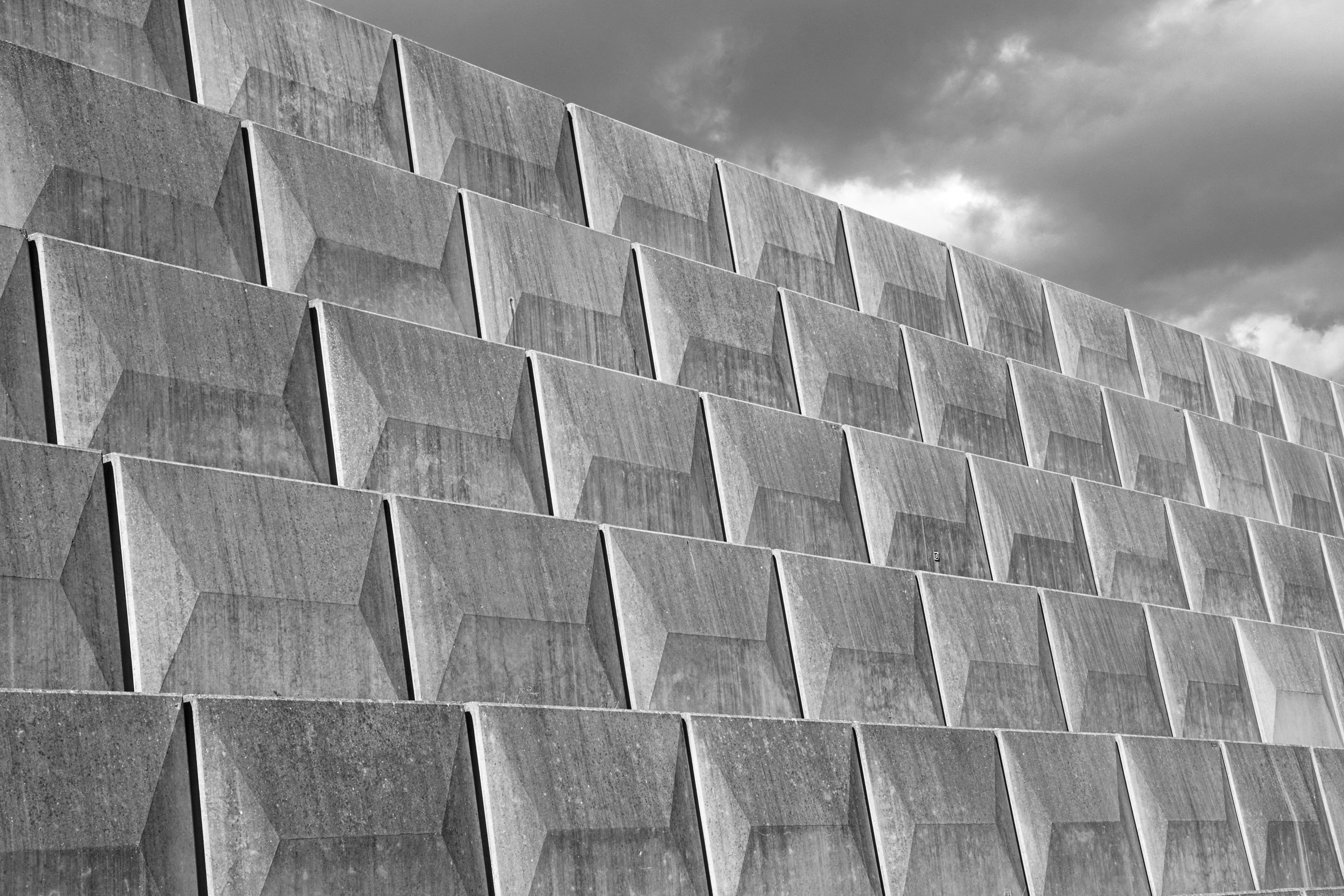 Barrage de Conqueyrac (amont) sur le Vidourle dans la Gard ( Occitanie ). Barrage écrêteur de crues construit en 1982 et propriété du conseil général du Gard. On distingue notamment le pertuis par lequel l'eau s'écoule.